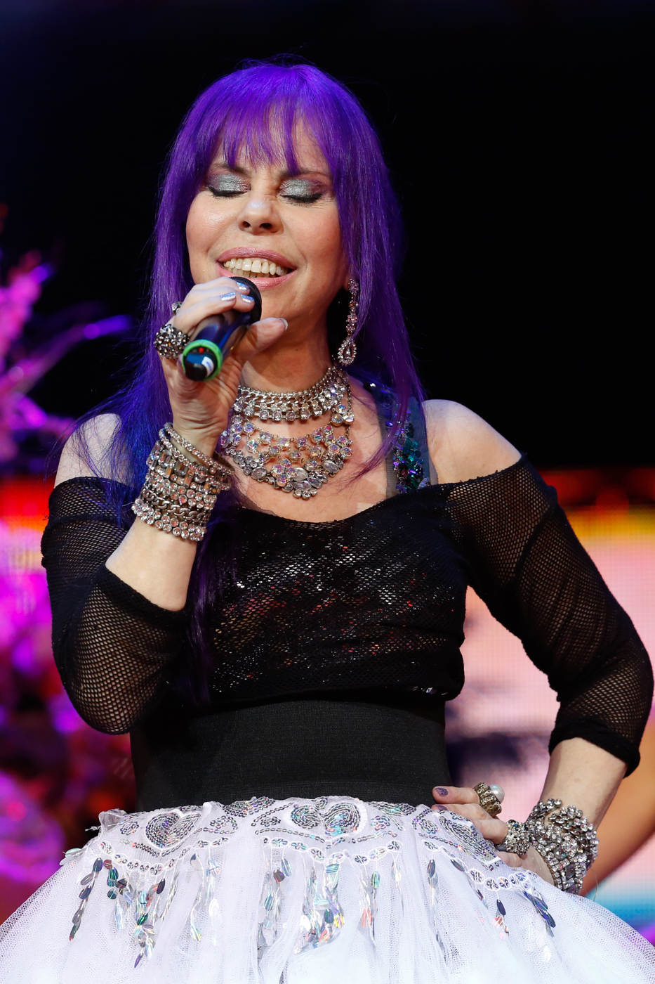 Baby do Brasil durante o 25o Premio da Musica Brasileira no Theatro Municipal. Foto: Roberto Filho (14/05/14)